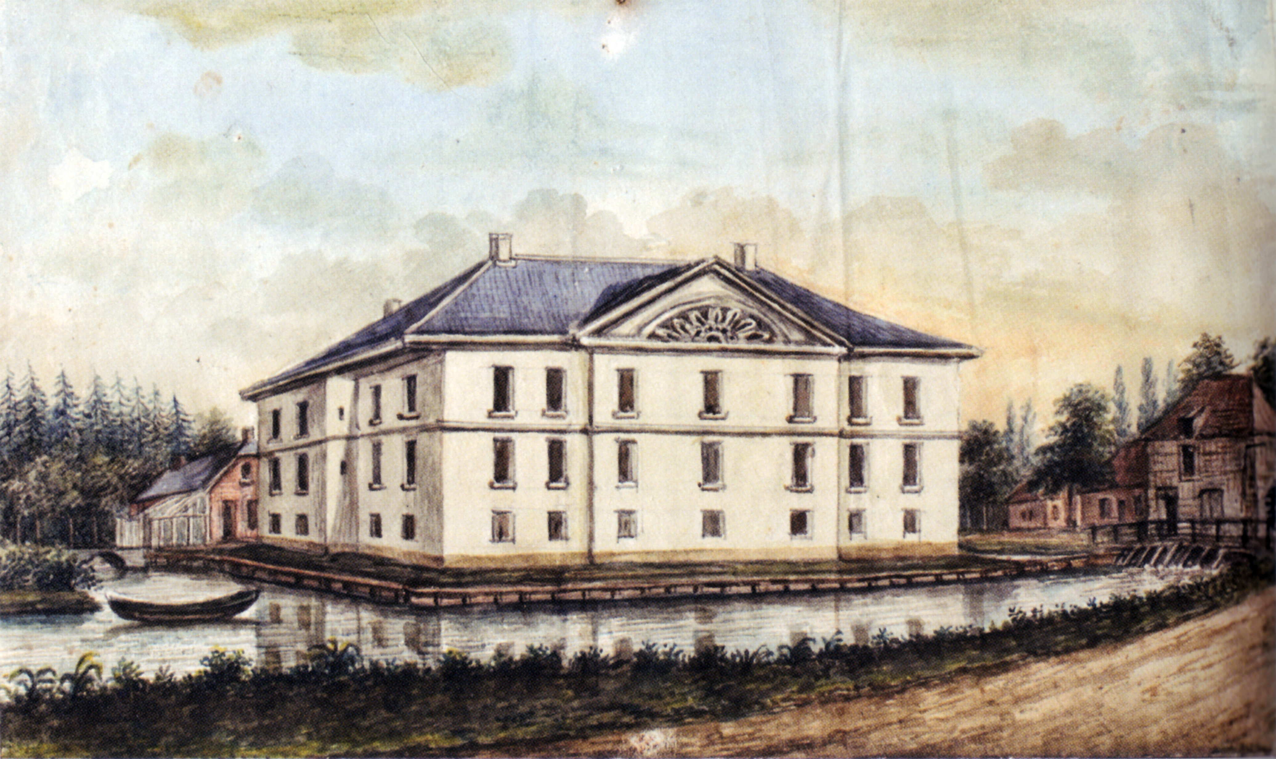 Haus Caen in Straelen, Ansicht von Osten